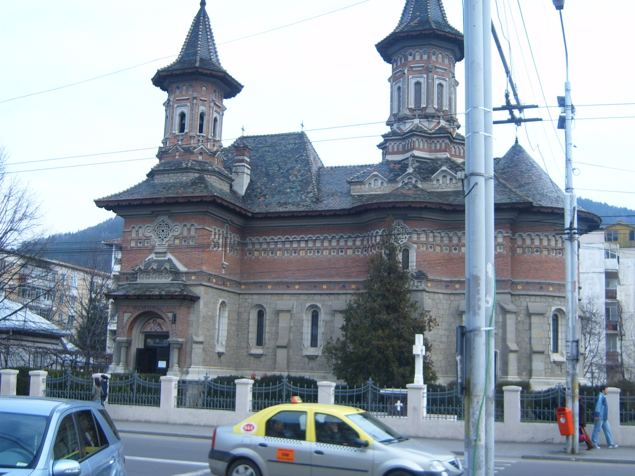 Biserica precista Piatra Neamt